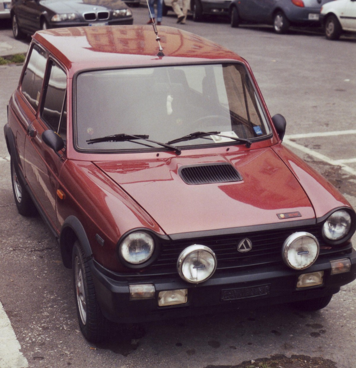 Autobianchi A112 Abarth 7ª serie del 1984